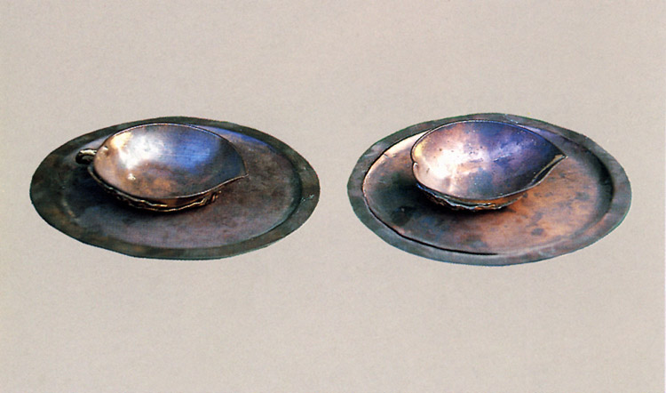 보물 제326호 이순신 유물 일괄 (李舜臣 遺物 一括) - 복숭아모양 술잔